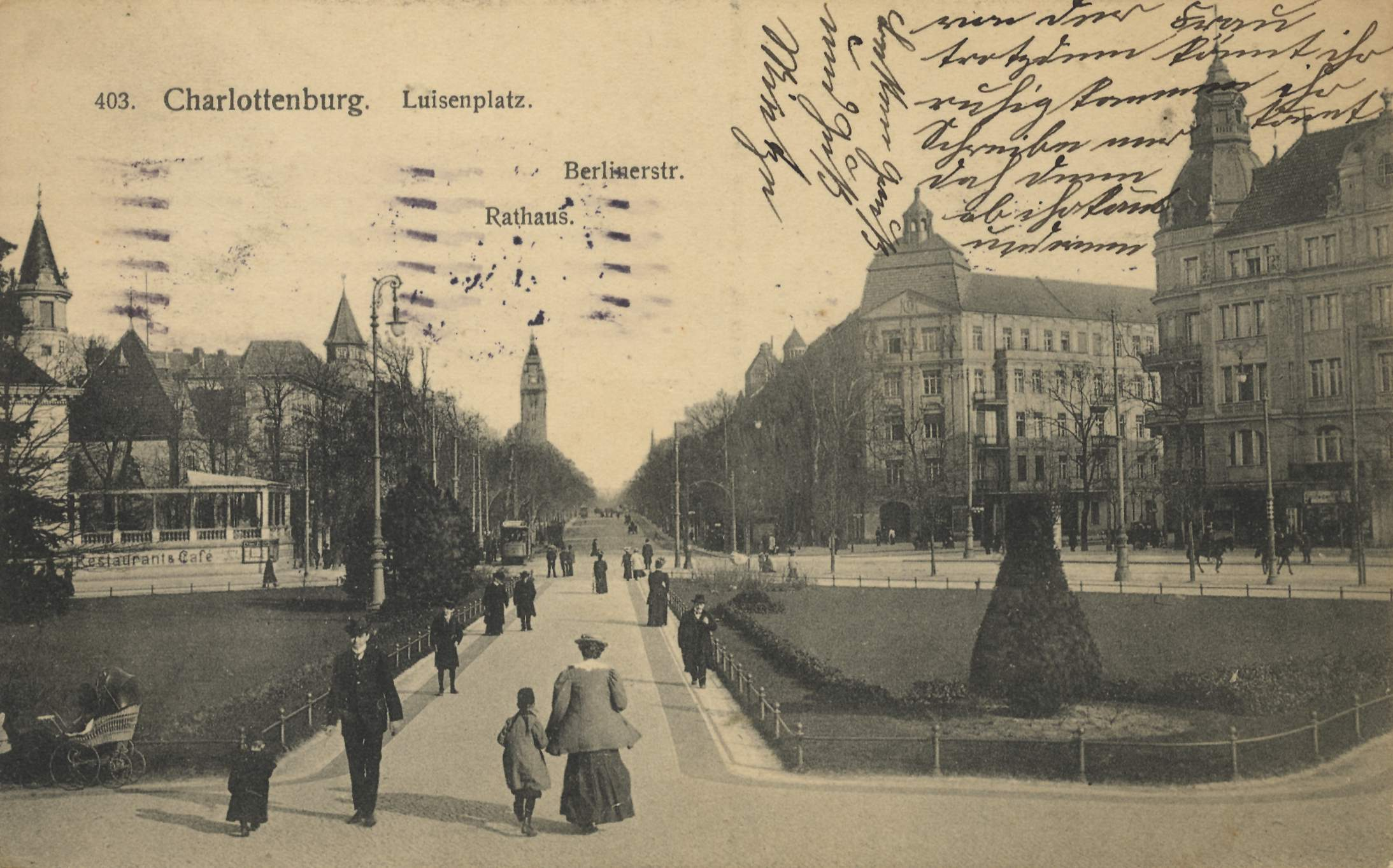 Blick vom Luisenplatz zur Berliner Straße (heute Otto-Suhr-Allee) in Charlottenburg